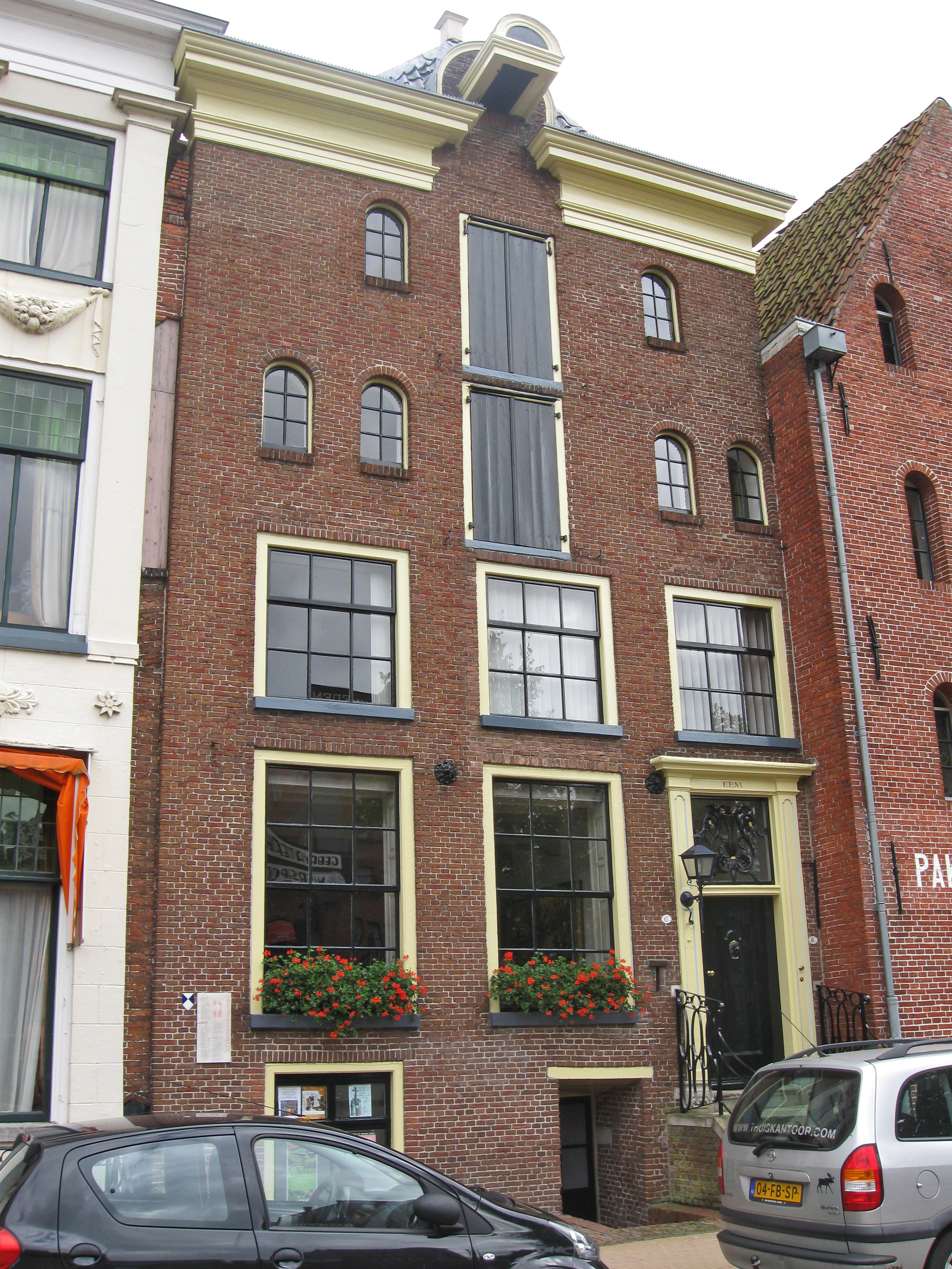 Groningen, Hoge der A 6, Pakhuis Eem, ca. 1330, verbouwd in de 17e eeuw, 1730 en 1839. 1974 (rest.); rm 18514